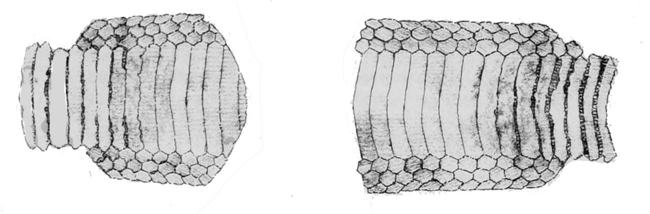 Myliobatis australis